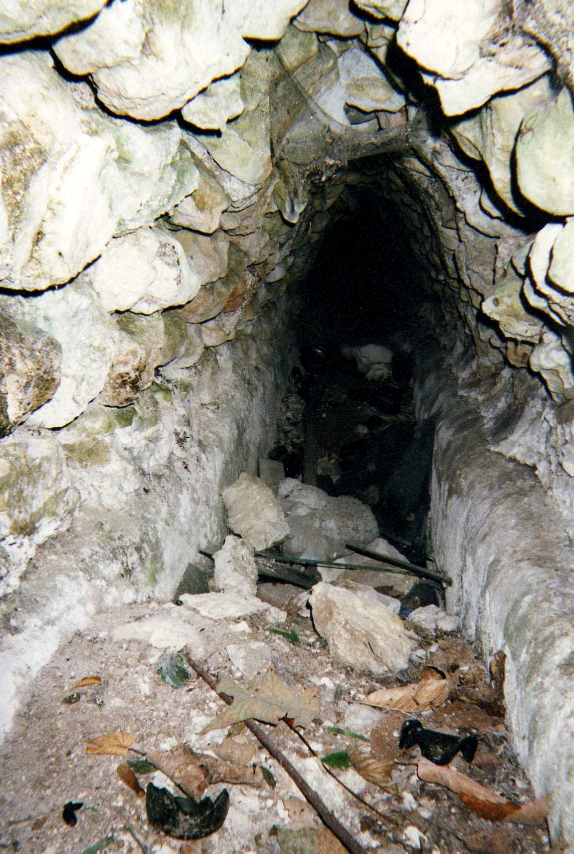 coupe de l'aqueduc alimentant Tours en eau sous le Haut Empire (Larçay, 37)